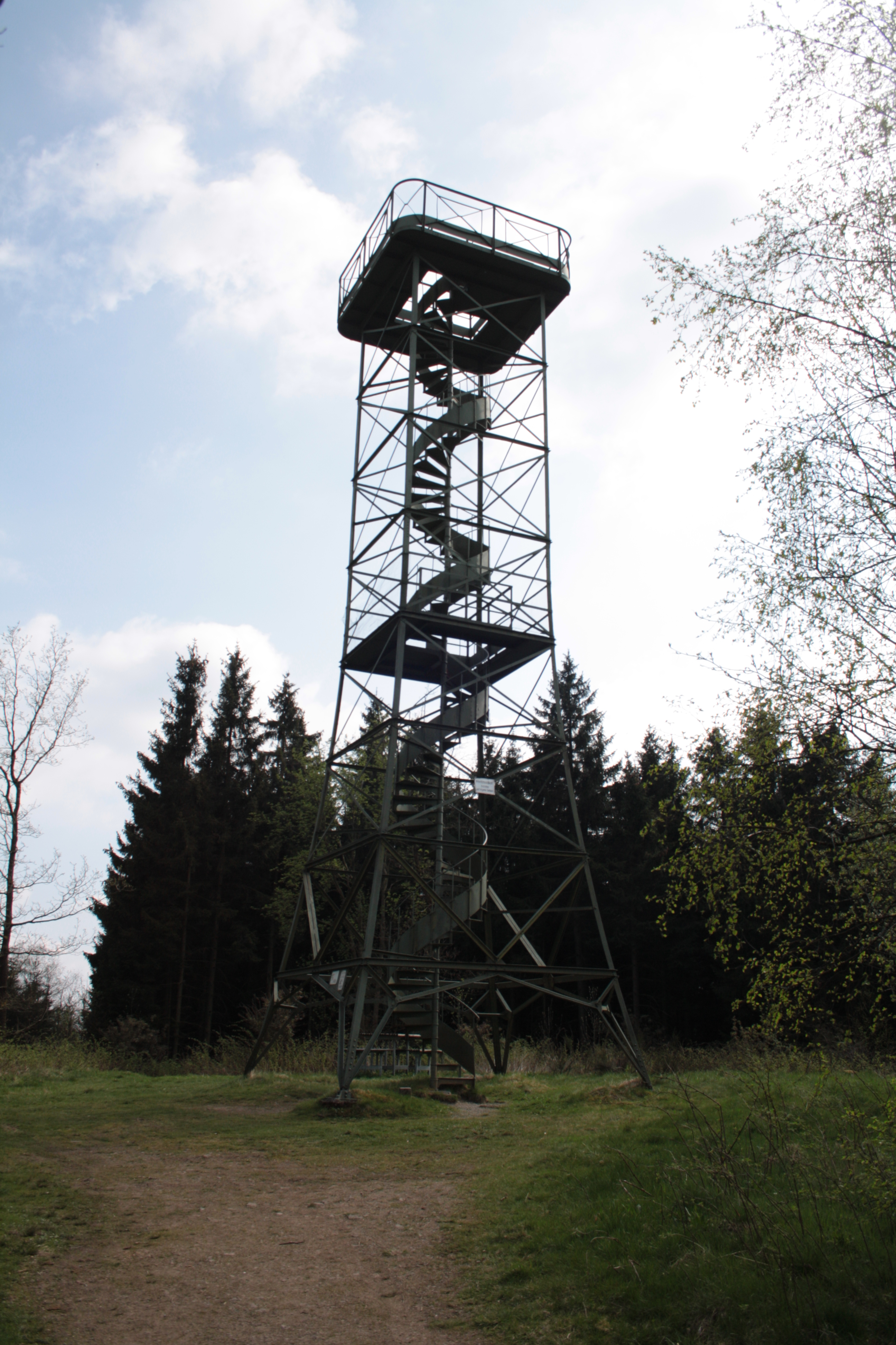 Gillerturm